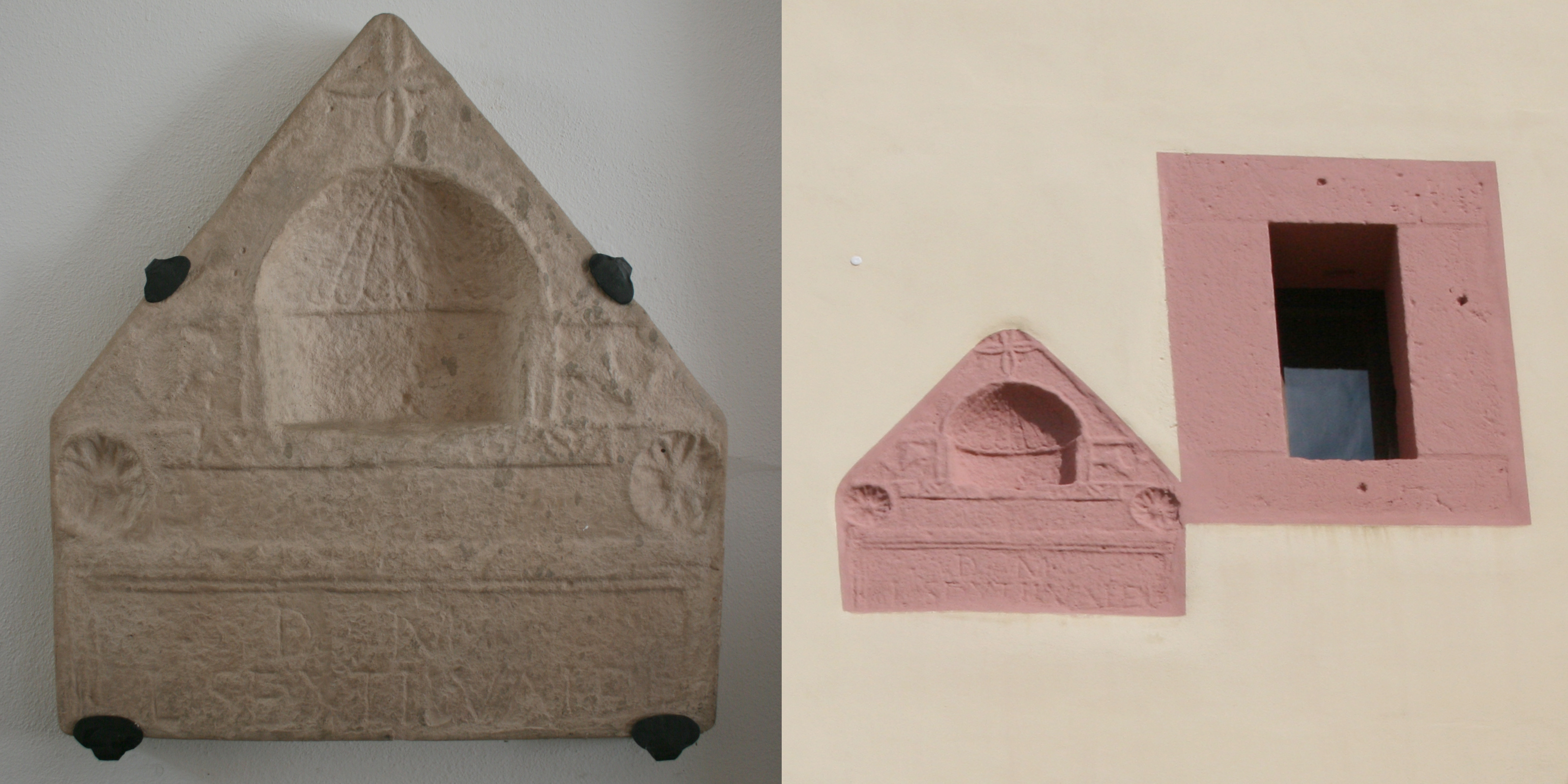 Teil eines römischen Grabsteins des Lucius Sextius Valens, in der evangelischen Pfarrkirche von Bad König vermauert; links Abguss, rechts Original, CIL XIII, 06521.